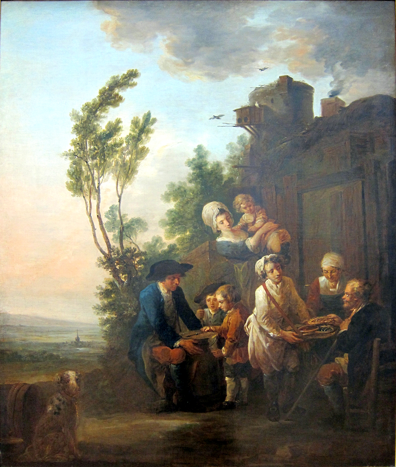 Le marchand d'oublies (Palais des Beaux-Arts de Lille).